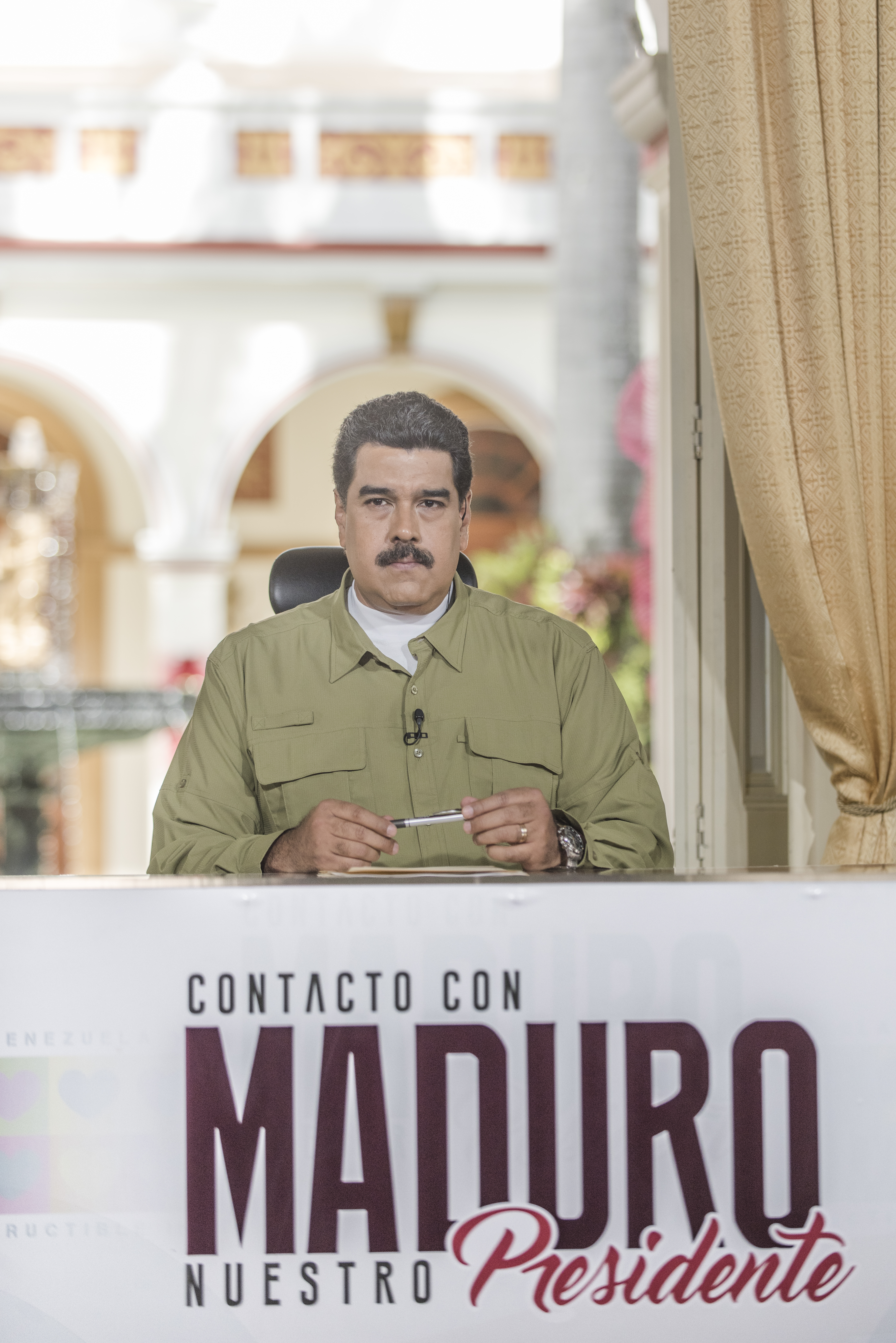 Nicolás Maduro en 2016